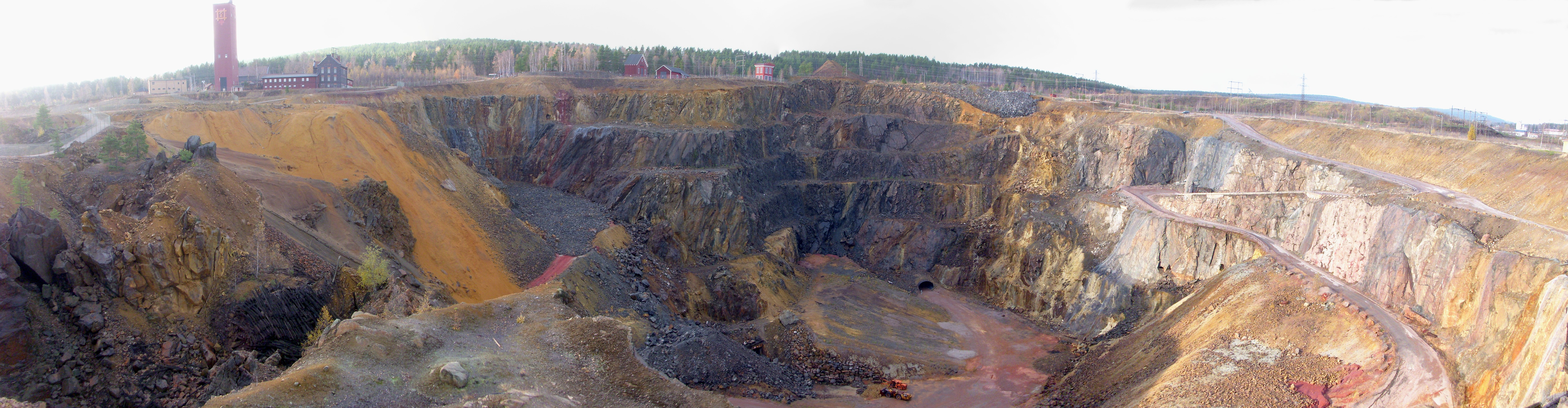 Falu koppargruva "Stora stöten" panorama